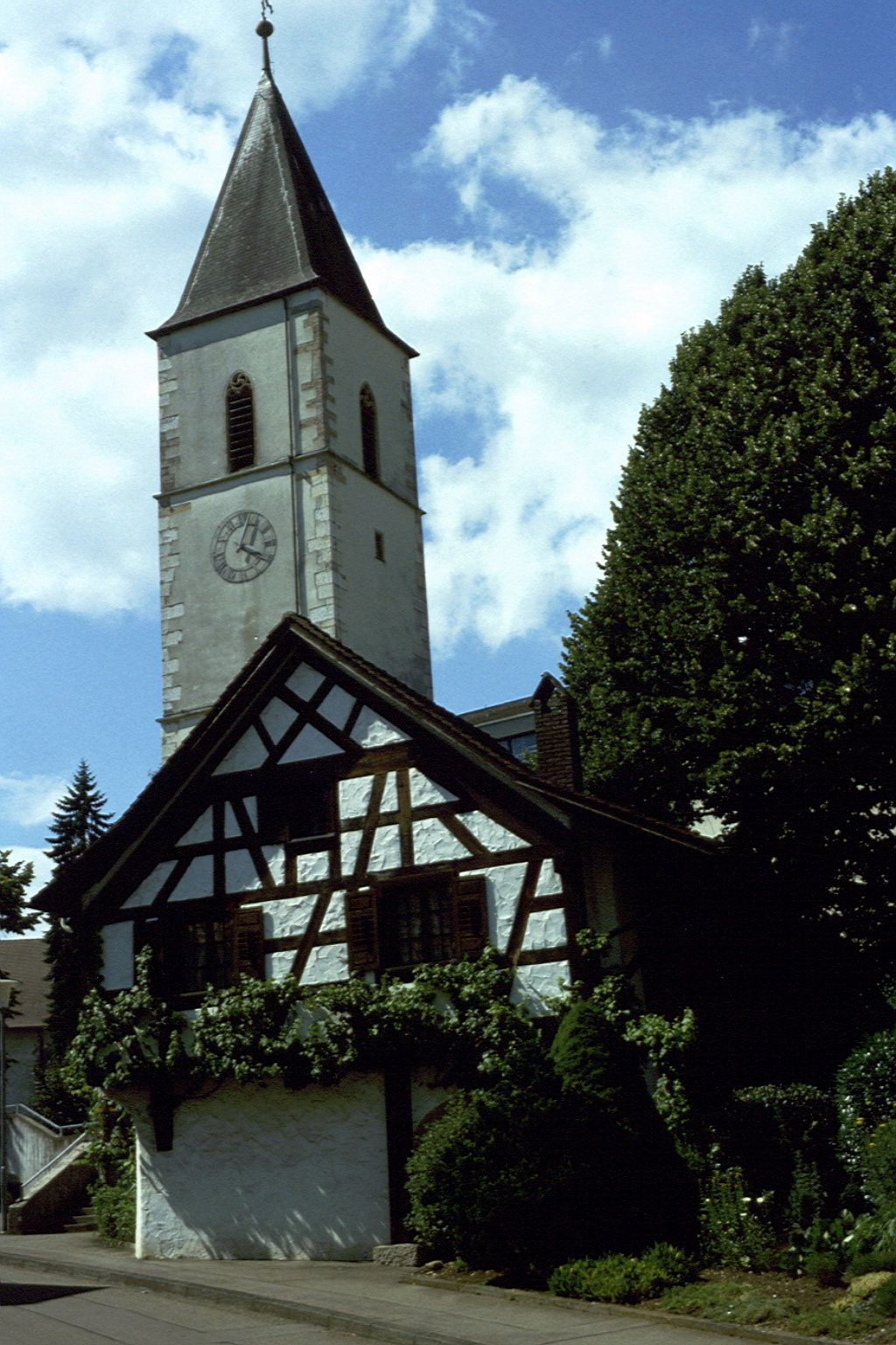 Katholische Kirche mit „Schnaksehüsli“ in Erzingen, Klettgau (Gemeinde), Landkreis Waldshut, Baden-Württemberg.